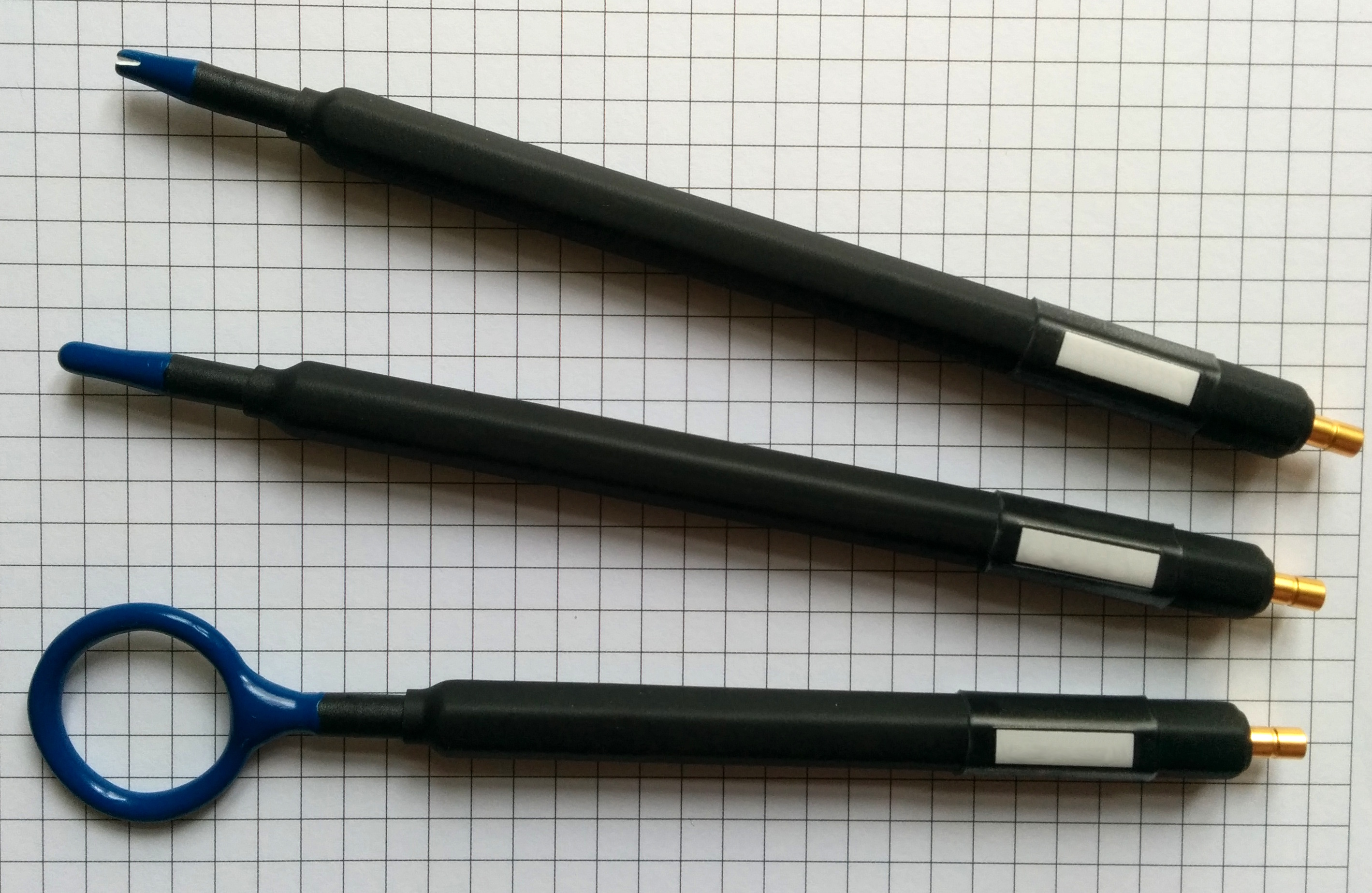 Verschiedene Nahfeldsonden zur kontaktlosen Erfassung der elektrischen oder magnetischen Felder im Nahfeld, beispielsweise zur Beurteilung der Störemissionen an elektrischen Leiterplatten.